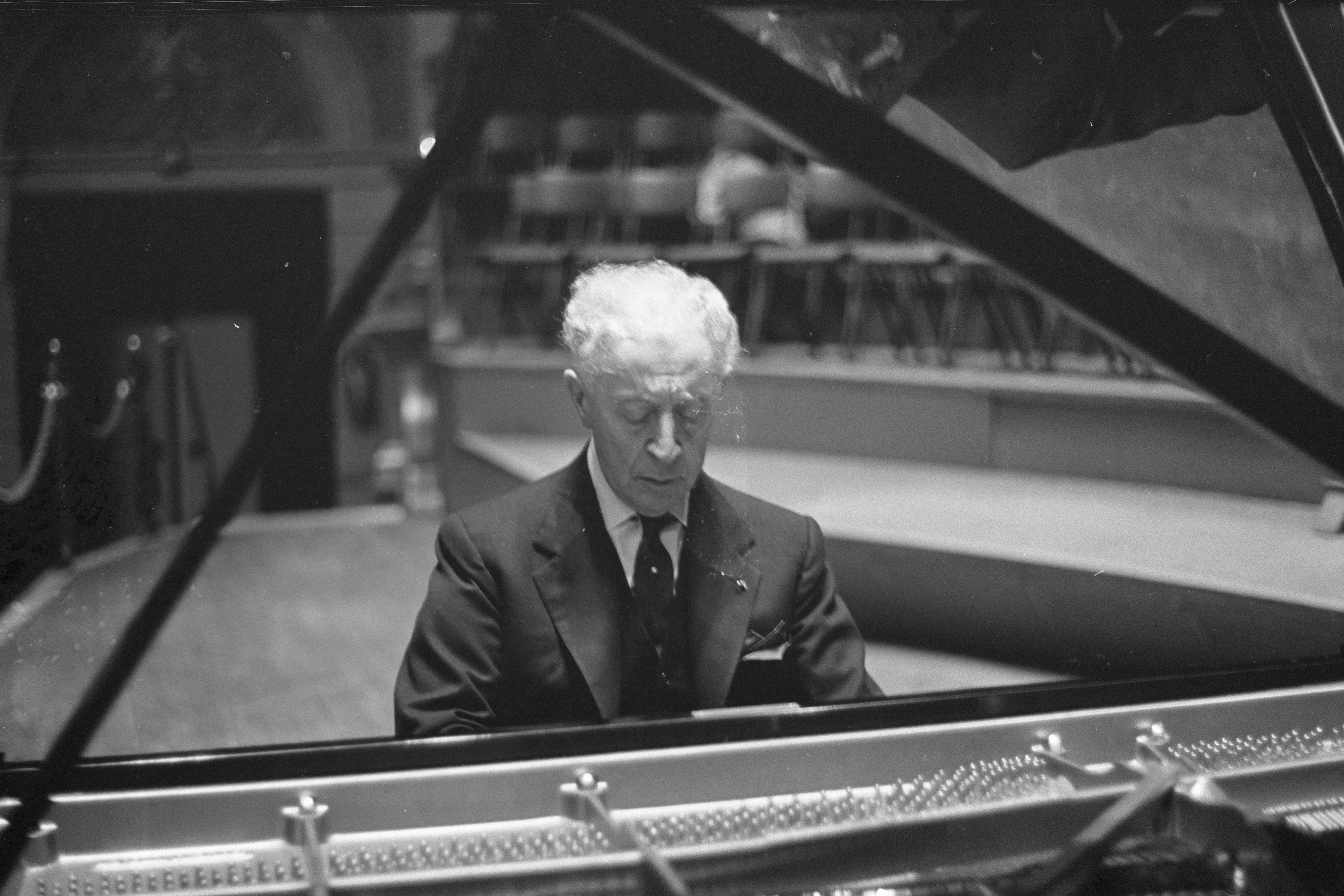 Collectie / Archief : Fotocollectie Anefo Reportage / Serie : [ onbekend ] Beschrijving : Optreden Arthur Rubinstein in Concertgebouw Datum : 13 februari 1962 Locatie : Amsterdam, Noord-Holland Trefwoorden : muziek, muziekuitvoeringen, pianisten Persoonsnaam : Rubinstein, Arthur Fotograaf : Rossem, Wim van / Anefo Auteursrechthebbende : Nationaal Archief Materiaalsoort : Negatief (zwart/wit) Nummer archiefinventaris : bekijk toegang 2.24.01.05 Bestanddeelnummer : 913-5231